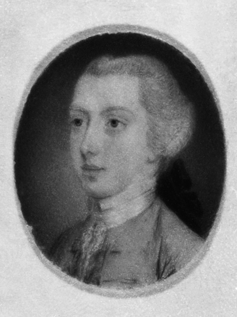 Friedrich Wilhelm, Prinz von Großbritannien (1750-1765); jüngster Bruder Georgs III.